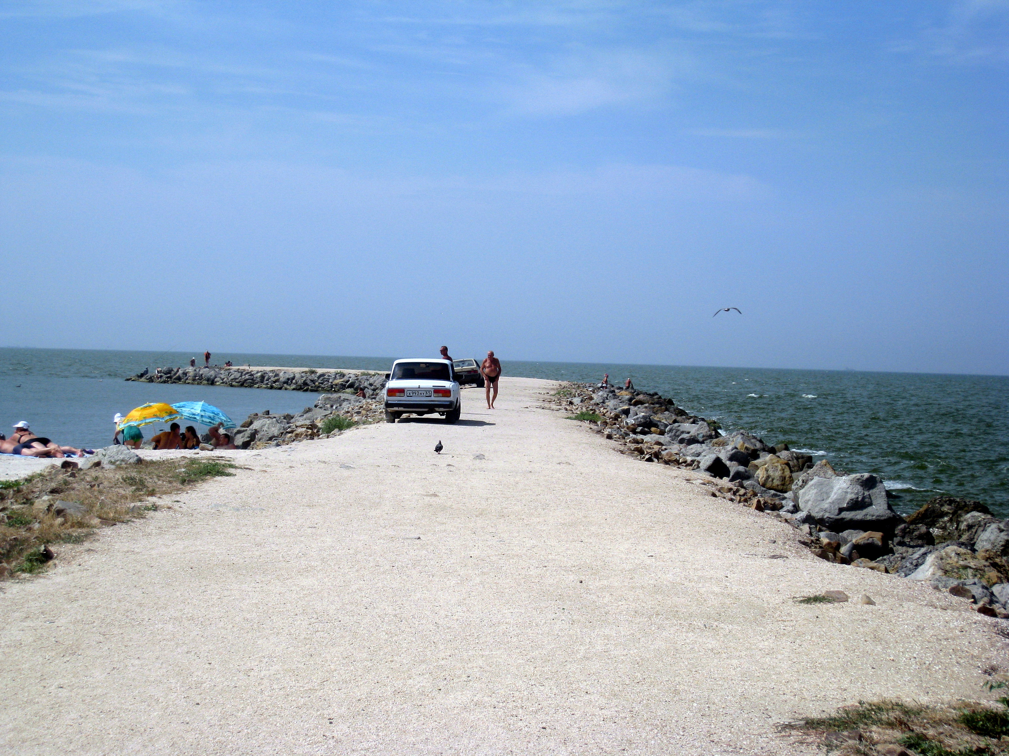 На косе